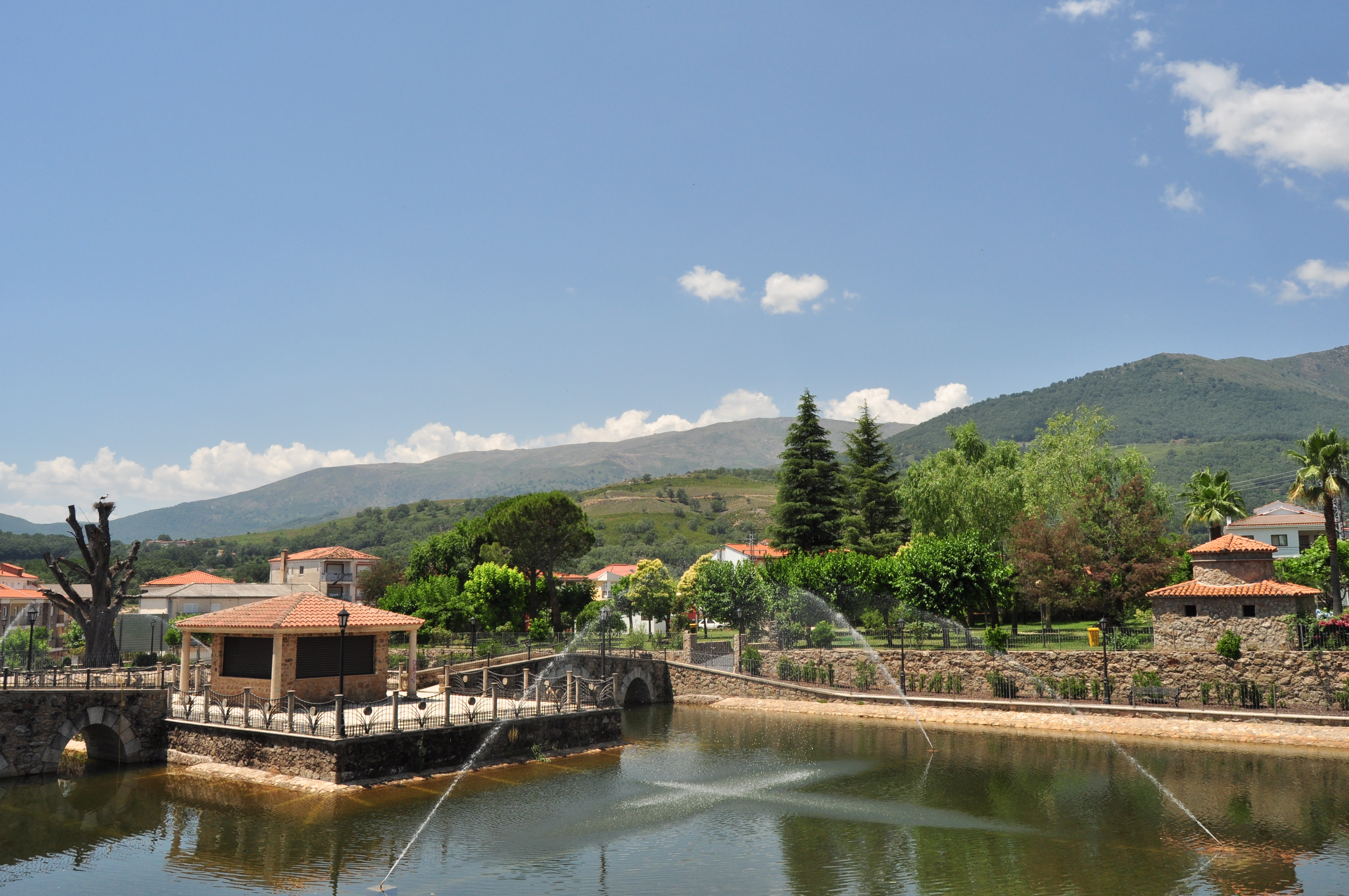 Jarandilla de la Vera - 002